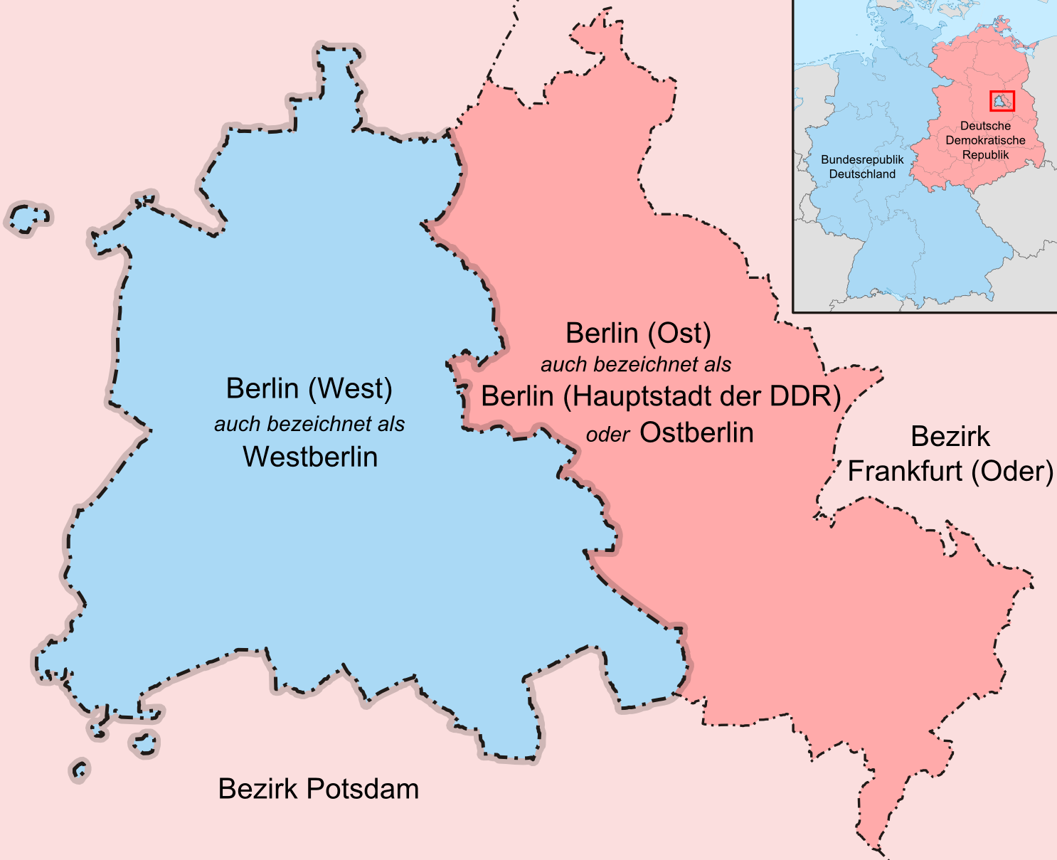 Karte des geteilten Berlins in seinen Grenzen von 1949 bis 1990